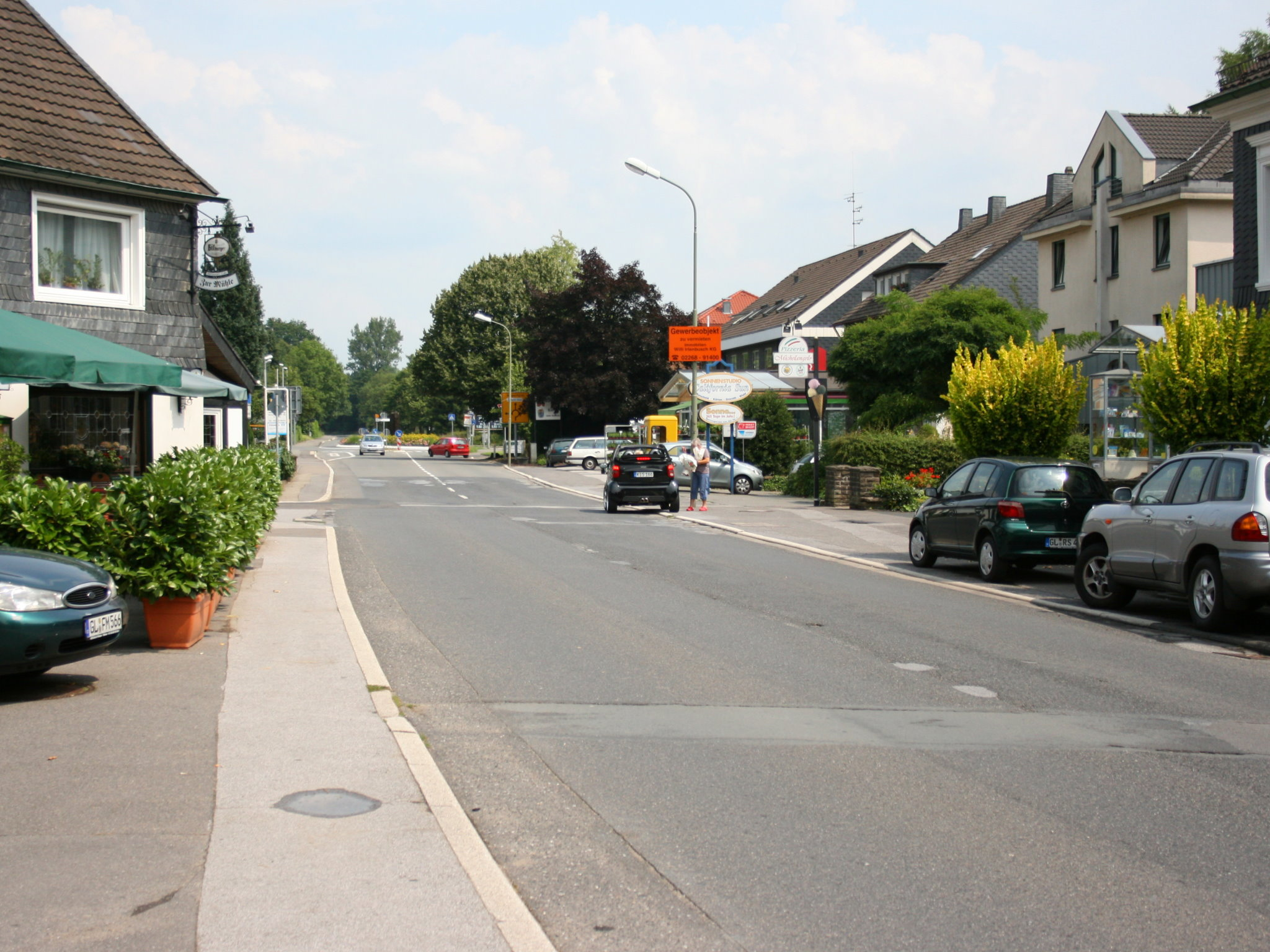 Kürten